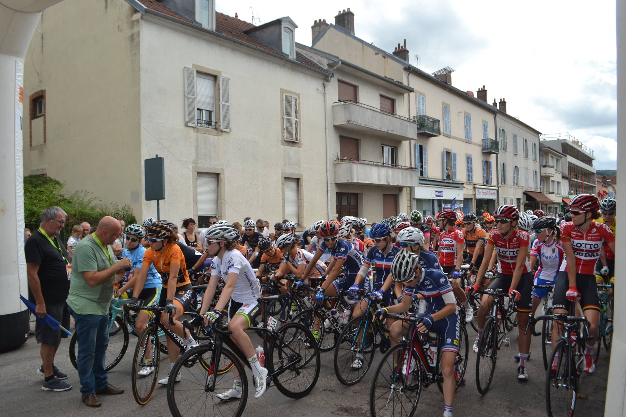 Le départ de la 5e étape de la Route de France féminine 2015